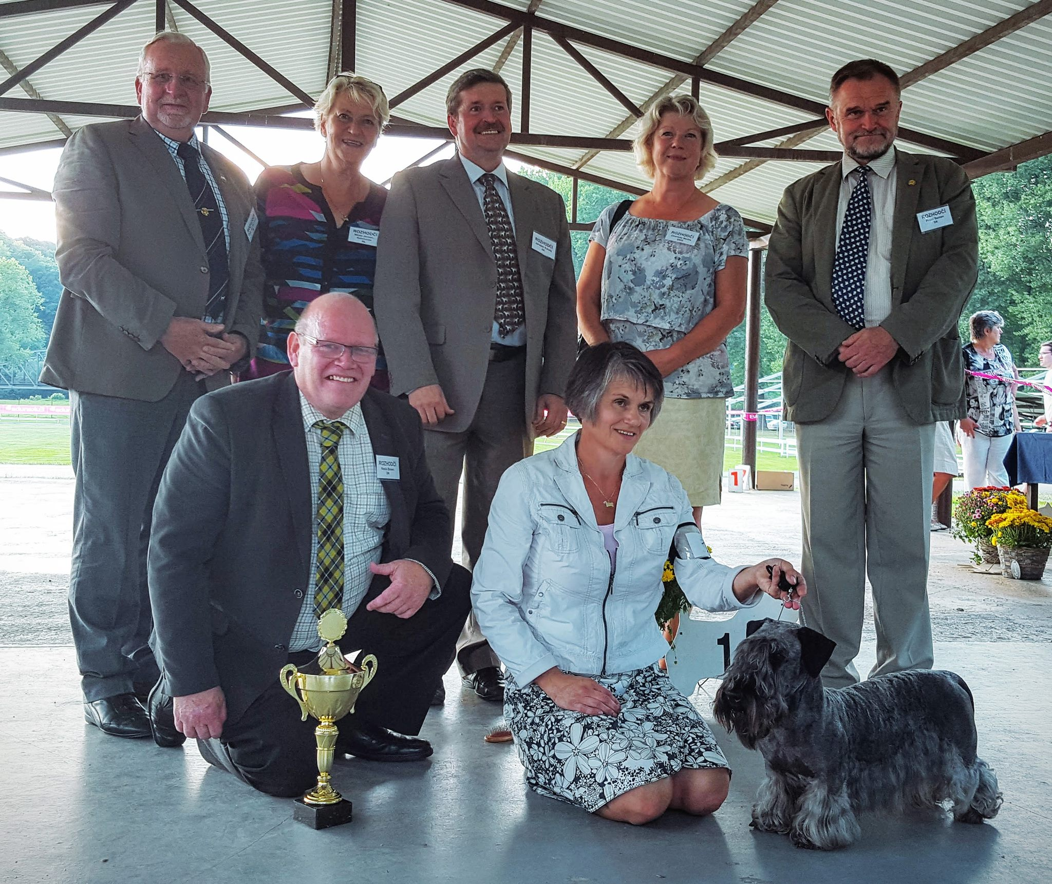 Závěrečné foto vítěze a všech rozhodčích 67. klubové výstavy Klubu chovatelů teriérů konané dne 10. 9. 2016 v Mladé Boleslavi.